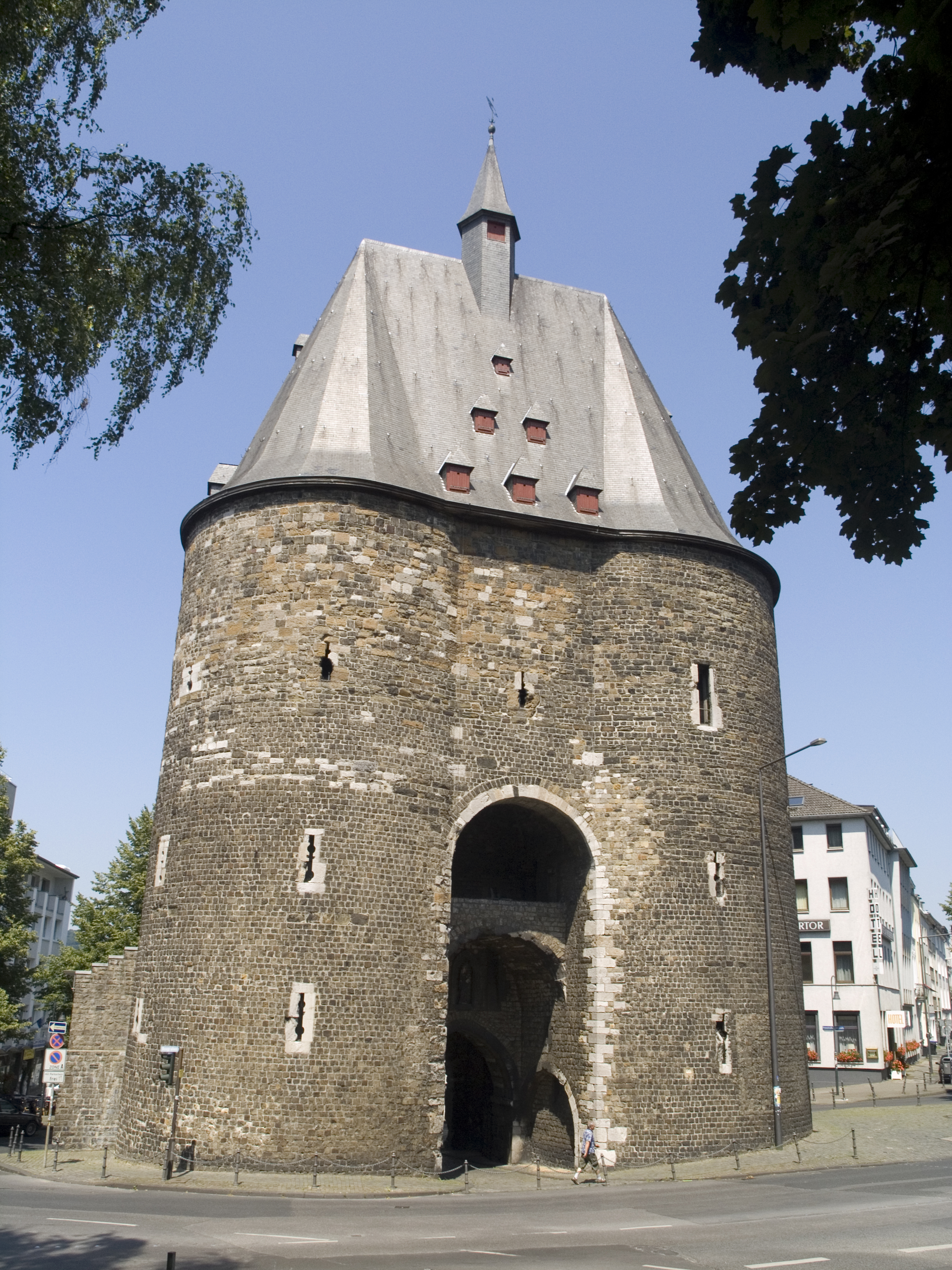 Германия, Северный Рейн-Вестфалия. Городские ворота Marschiertor